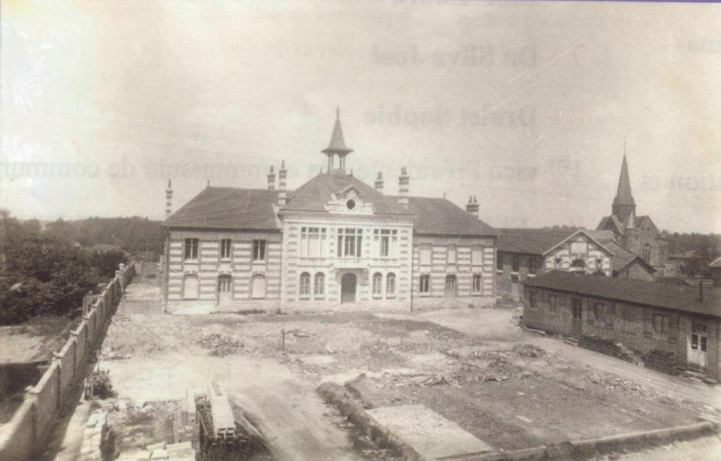 La mairie de Pargny-sur-saulx lors de sa reconstruction après les bombardements de septembre 1914.